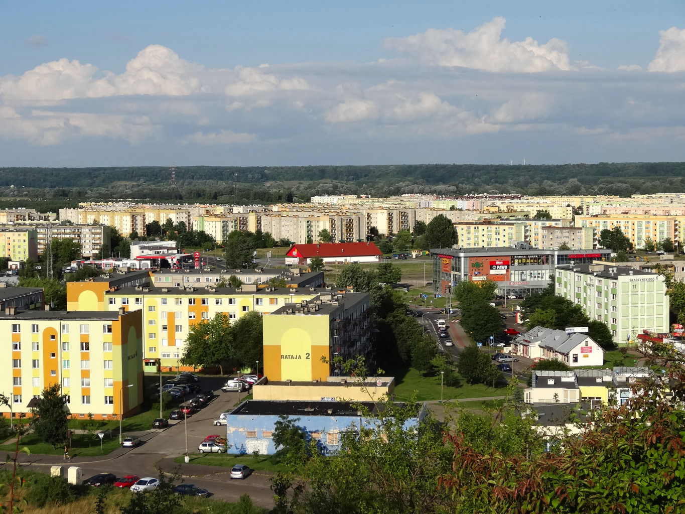 Widok z Góry Szybowników w kierunku wschodnim na osiedla Szybowników, Kasztelanka i Nad Wisłą w dzielnicy Fordon w Bydgoszczy. W tle wschodnie zbocze Doliny Dolnej Wisły